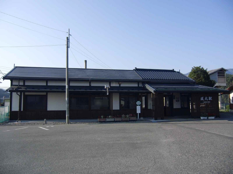 JR東日本篠ノ井線坂北駅の駅舎の写真です。